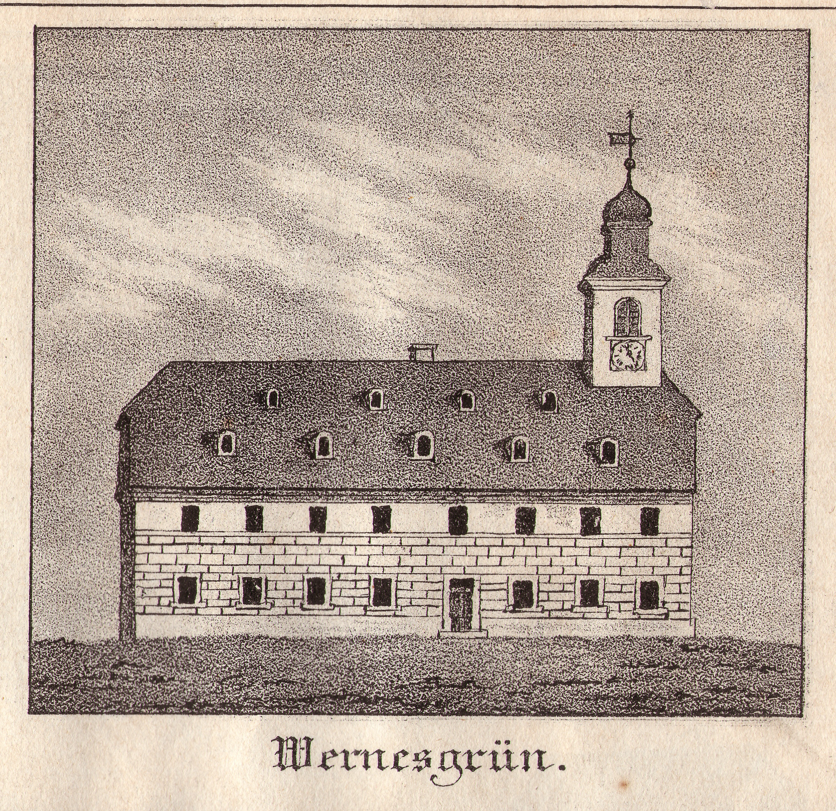 Sachsens Kirchen-Galerie erschien von 1837 bis 1848 im Verlag Hermann Schmidt Dresden und brachte in zahlreichen Lieferungen nach und nach 15 Bände in regionaler Gliederung. In der Regel waren die jeweils amtierenden Pfarrer die Verfasser und beschrieben die Kirchorte. Sie schilderten die Kirchen, deren Baugeschichte, Baustil und Ausstattung wie Altar, Taufstein, Gemälde, Orgel, Glocken, berichteten über die Schulverhältnisse, über die Namen der Pfarrer, die in der jeweiligen Gemeinde nacheinander tätig waren, erwähnten die Inhaber der Rechte zur Besetzung der Pfarrerstelle. Die Beiträge sind nicht einheitlich gestaltet. Nicht selten ist eine regelrechte Ortsgeschichte zusammengestellt. Im Band 11 von 1844 – Voigtland – finden sich zahlreiche Abbildungen, die oft nicht nur den Kirchenbau, sondern auch dessen Umgebung, das Dorf oder die Landschaft zeigen. Zu den Verfassern gibt es diese Angaben: „Nach der Natur gezeichnet von W. Wegener“ und „Steindruck von I. H. Ketschau“ (Angaben teilweise abgekürzt).Kirche in Wernesgrün/Vogtland